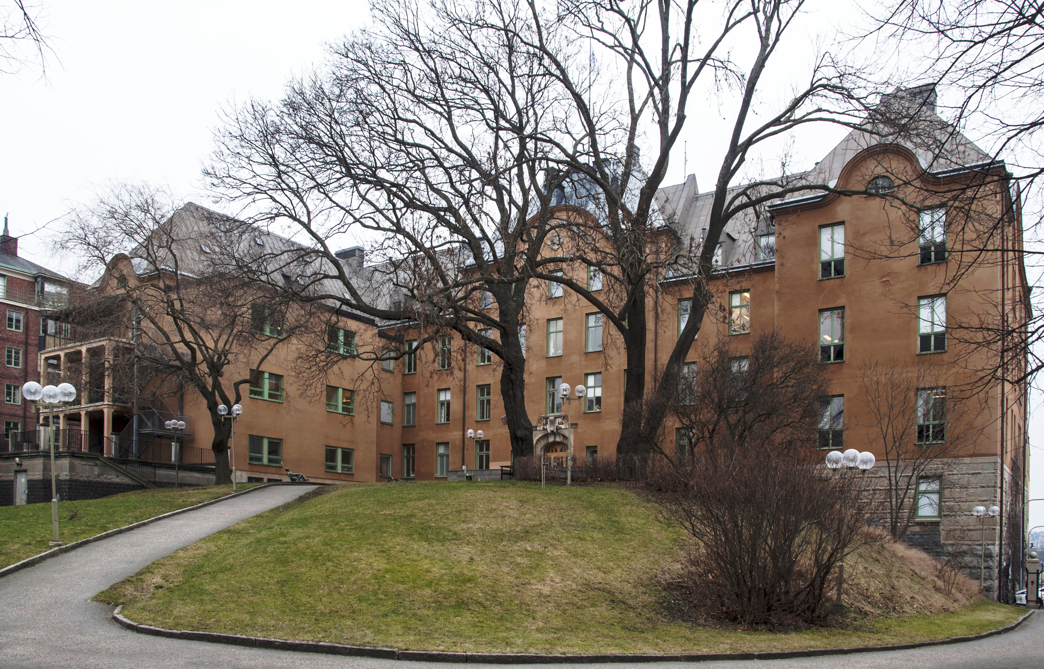 Ersta sjukhus. Byggnadsår 1905. Axel Kumlien (Arkitekt), Sv Diakonianstalten (Byggherre)